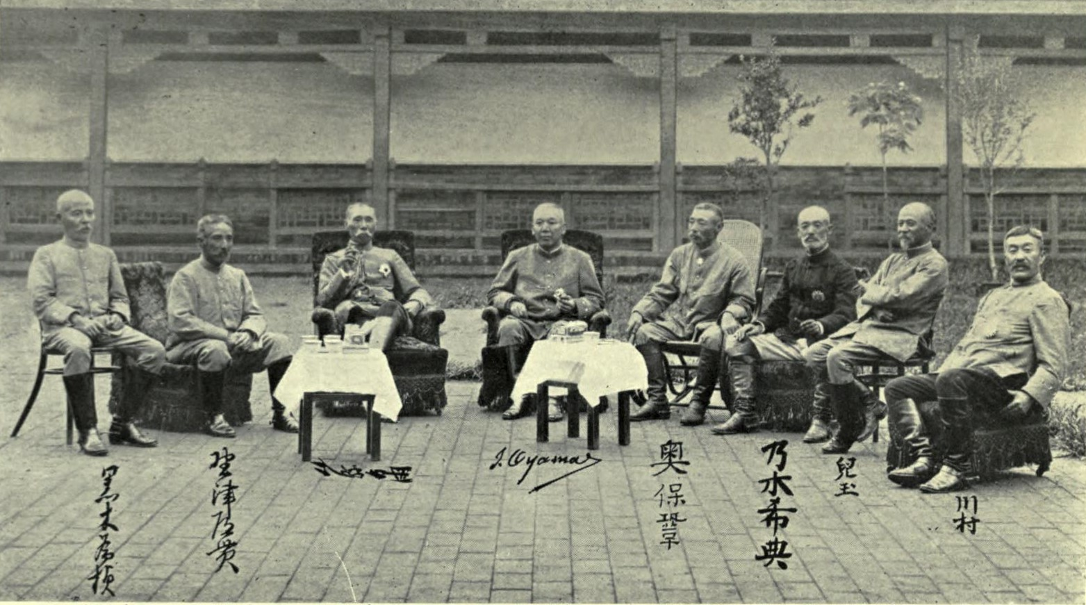 1905年、瀋陽にて。左から黒木為楨、野津道貫、山県有朋、大山巌、奥保鞏、乃木希典、児玉源太郎、川村景明